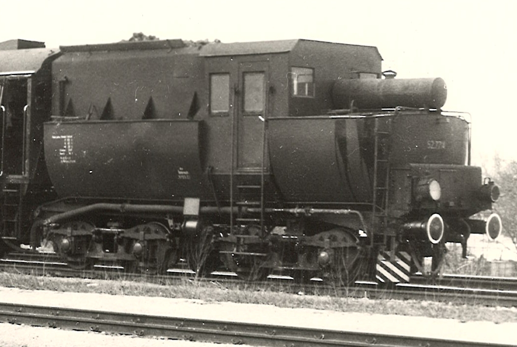 Kabinentender Österreich